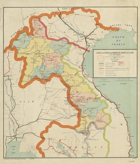 Carte des voies de communications du Laos et des pays voisins figurant l'état d'avancement des travaux en 1927... / dressé par l'ingénieur en chef de la circonscription territoriale des T. P. du Laos Ch. Mariage